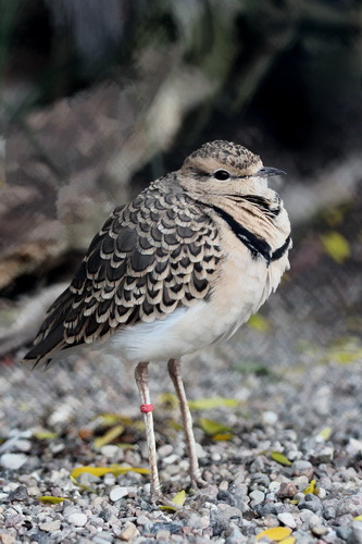 Африканский, двухполосый, бегунок (Rhinoptilus africanus) в Тирпарке Карла Гагенбека (Гамбургский зоопарк)